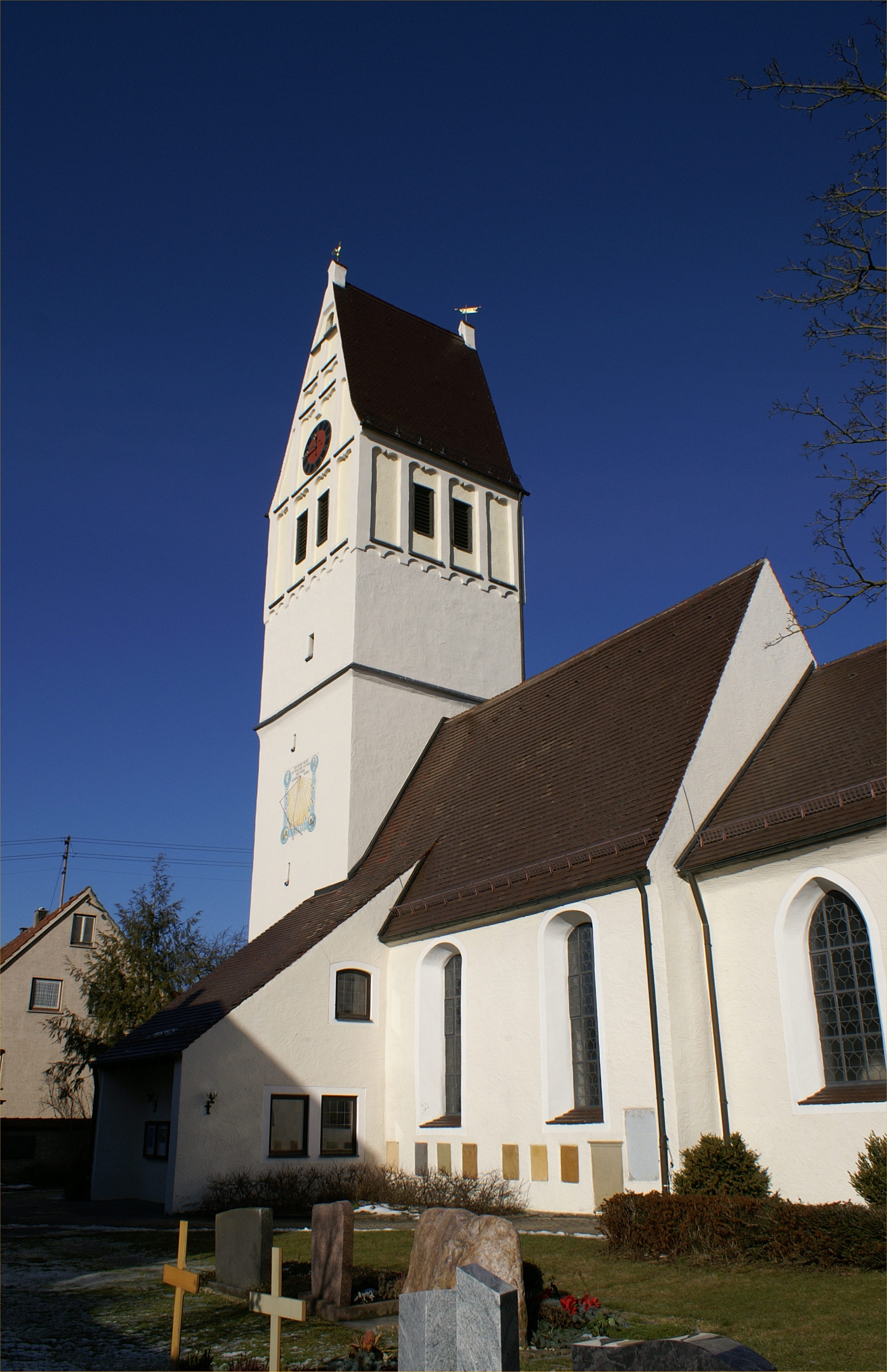 Laurentiuskirche Amstetten-Dorf im Alb-Donau-Kreis